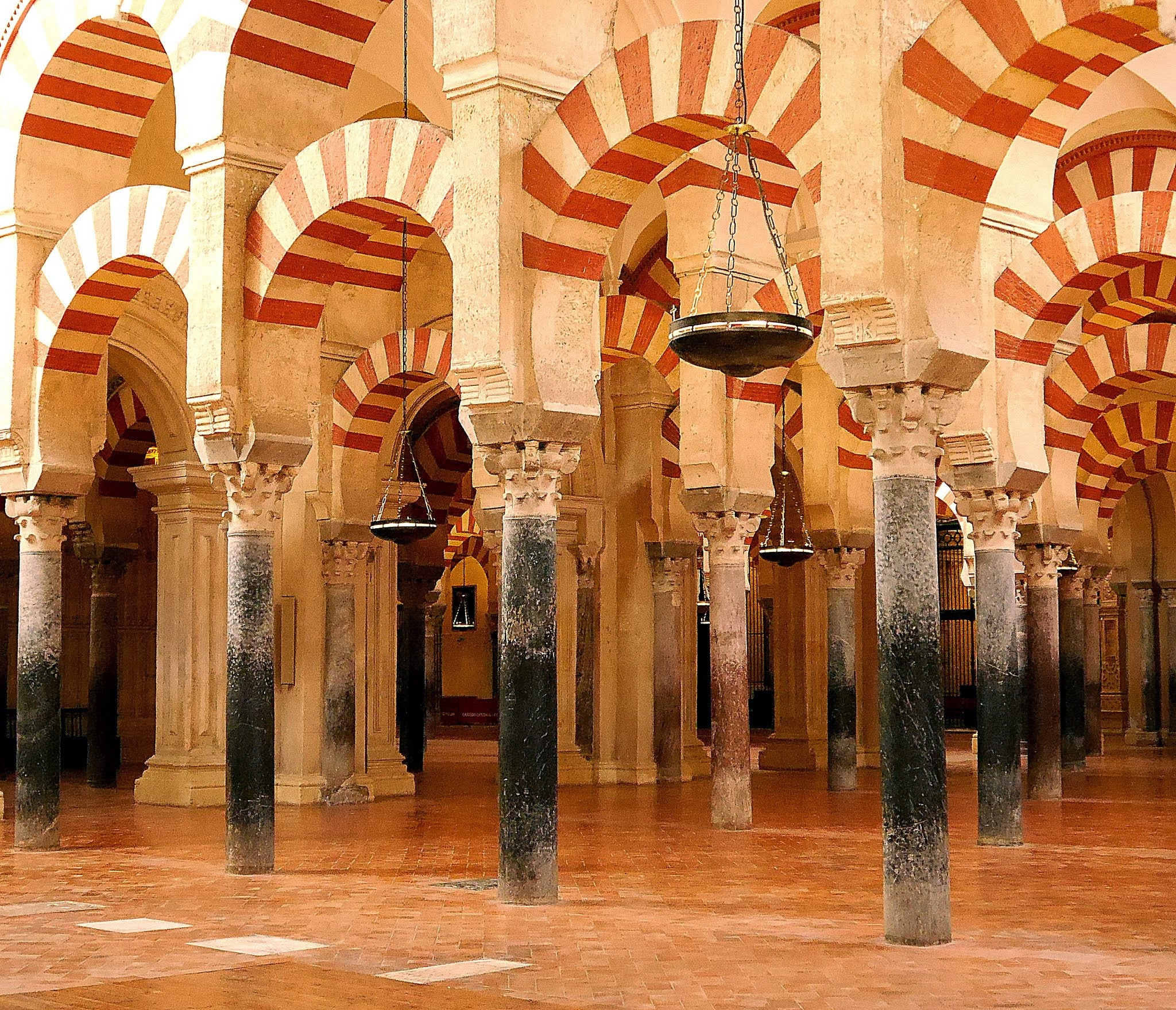 Rundbögen im Bereich der Moschee in der Kathedrale